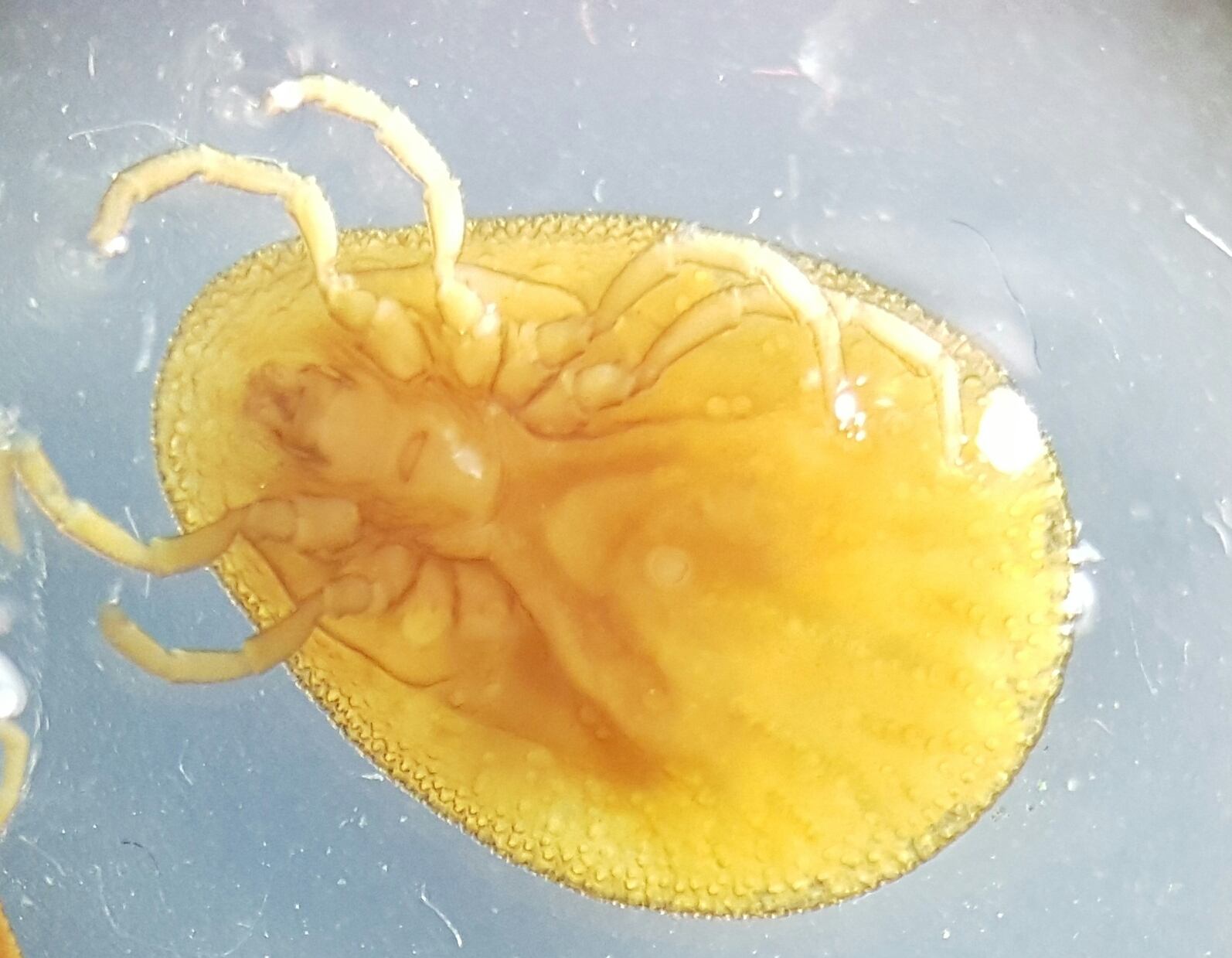 تصویری از این انگل در زیر loop